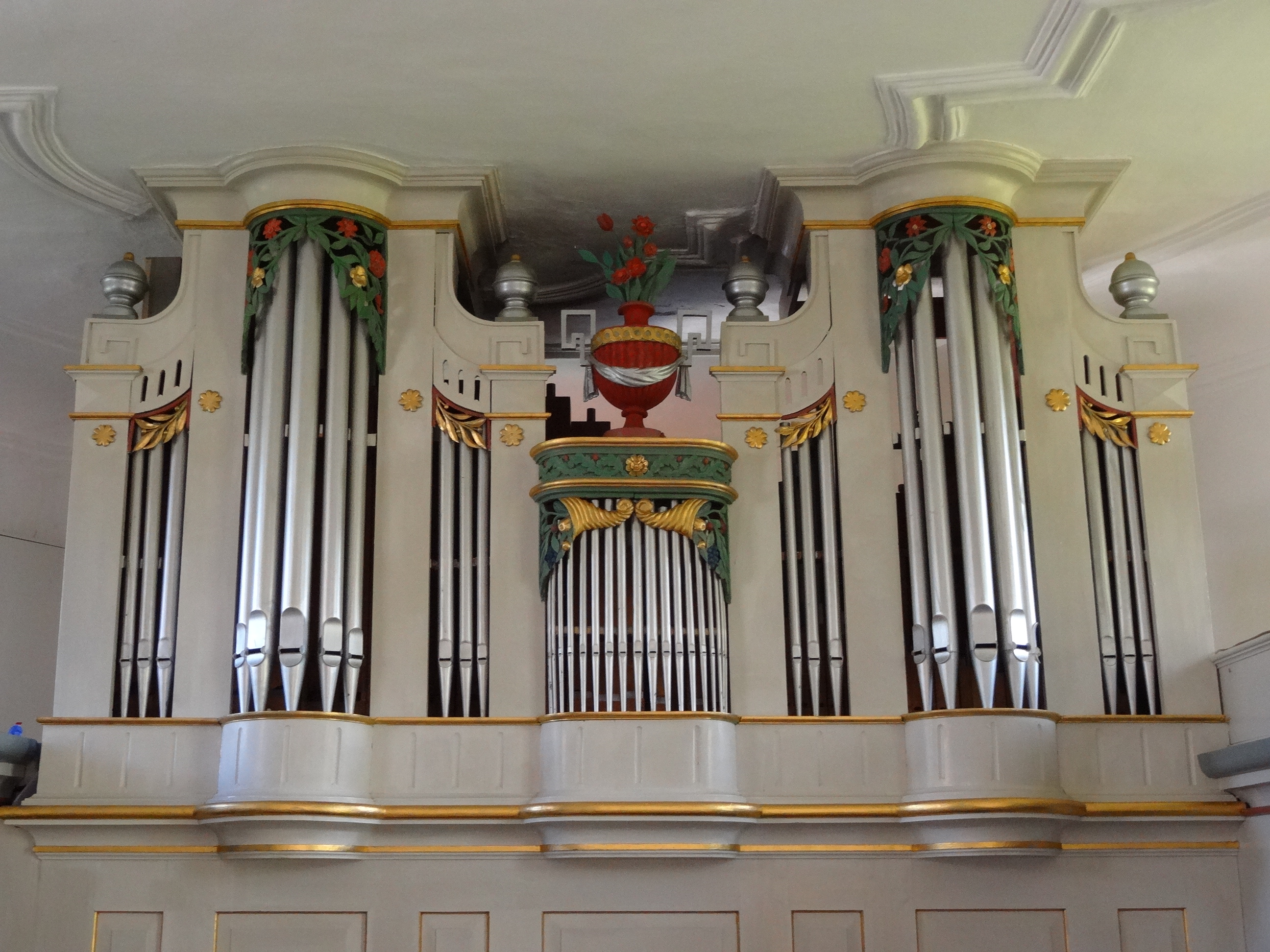 Evangelische Pfarrkirche Ebersgöns